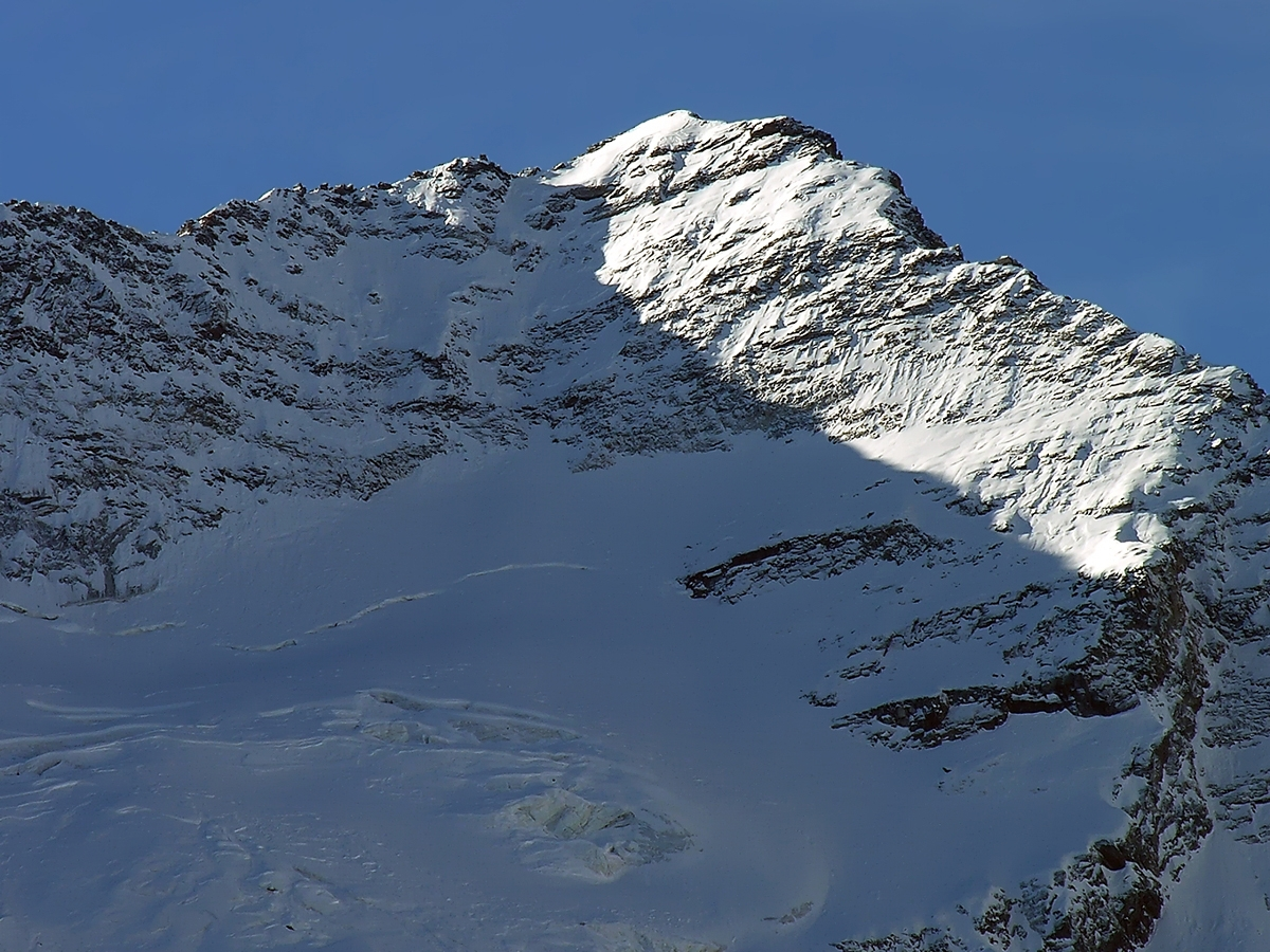 Monti la punta delle Sengie Lillaz (25-03-2005) - Alpi Graie - Italia